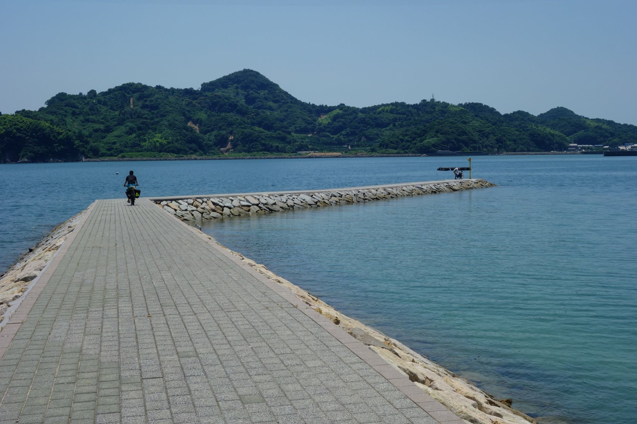 愛媛県松山市中島の大浦港近くのアミアゲビーチの堤防。釣りスポットとして知られる（らしい）。